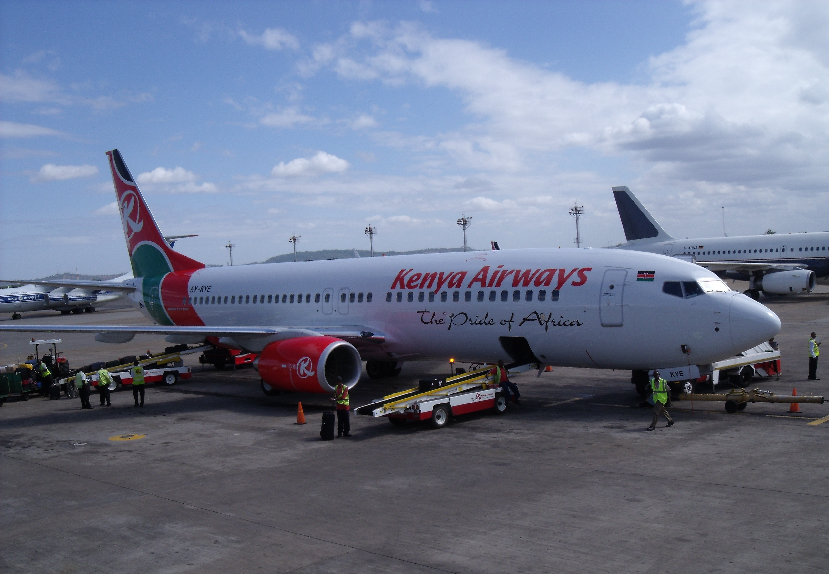 Mombasa - Moi International (MBA / HKMO) Kenya, April 24, 2011